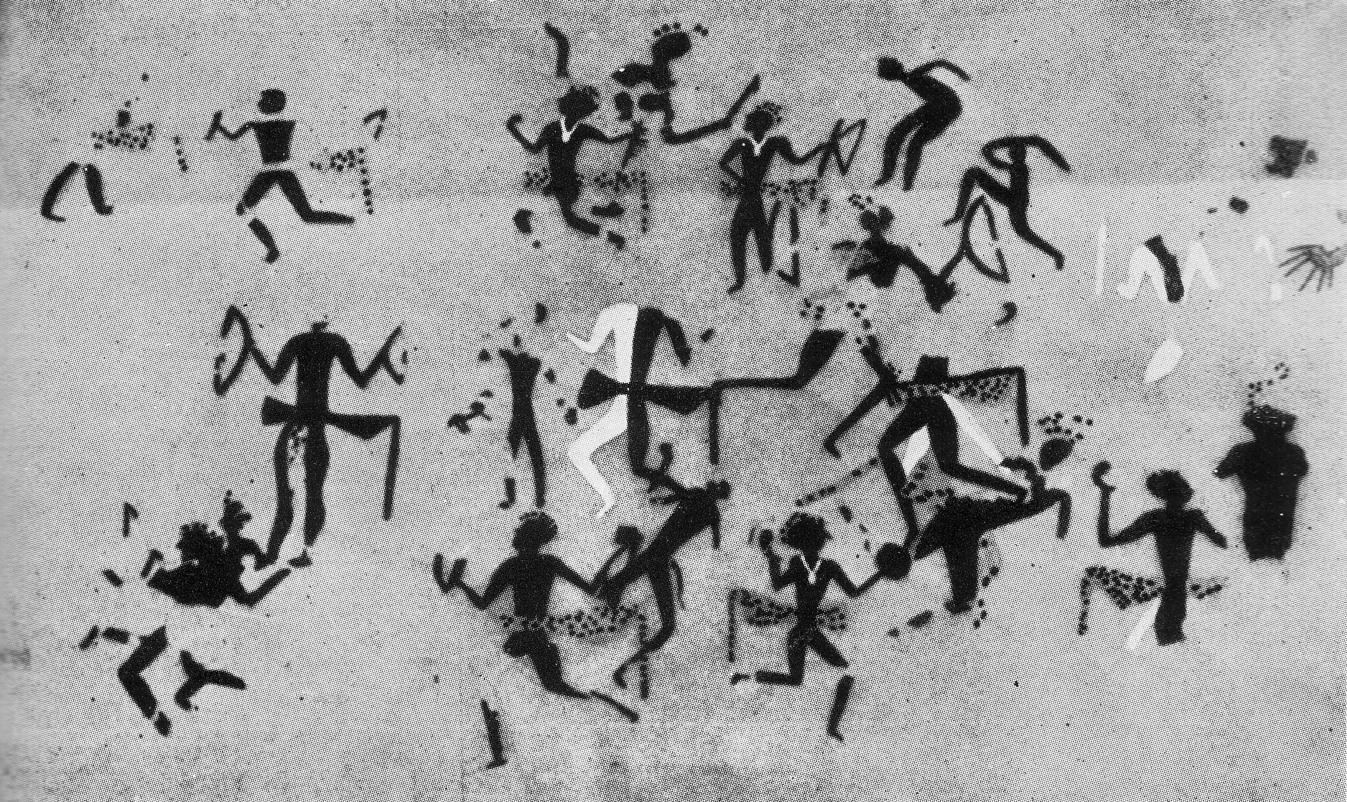 Bildunterschrift: Tänzer mit Leopardenfellen. Chatal Hüyük, 6. Jahrtausend v. u. Z. Nach Mellart, Excavations at Chatal, Hüyük, 1961. In. Anatolian Studies, Bd. 12. 1962, T. XIV b.